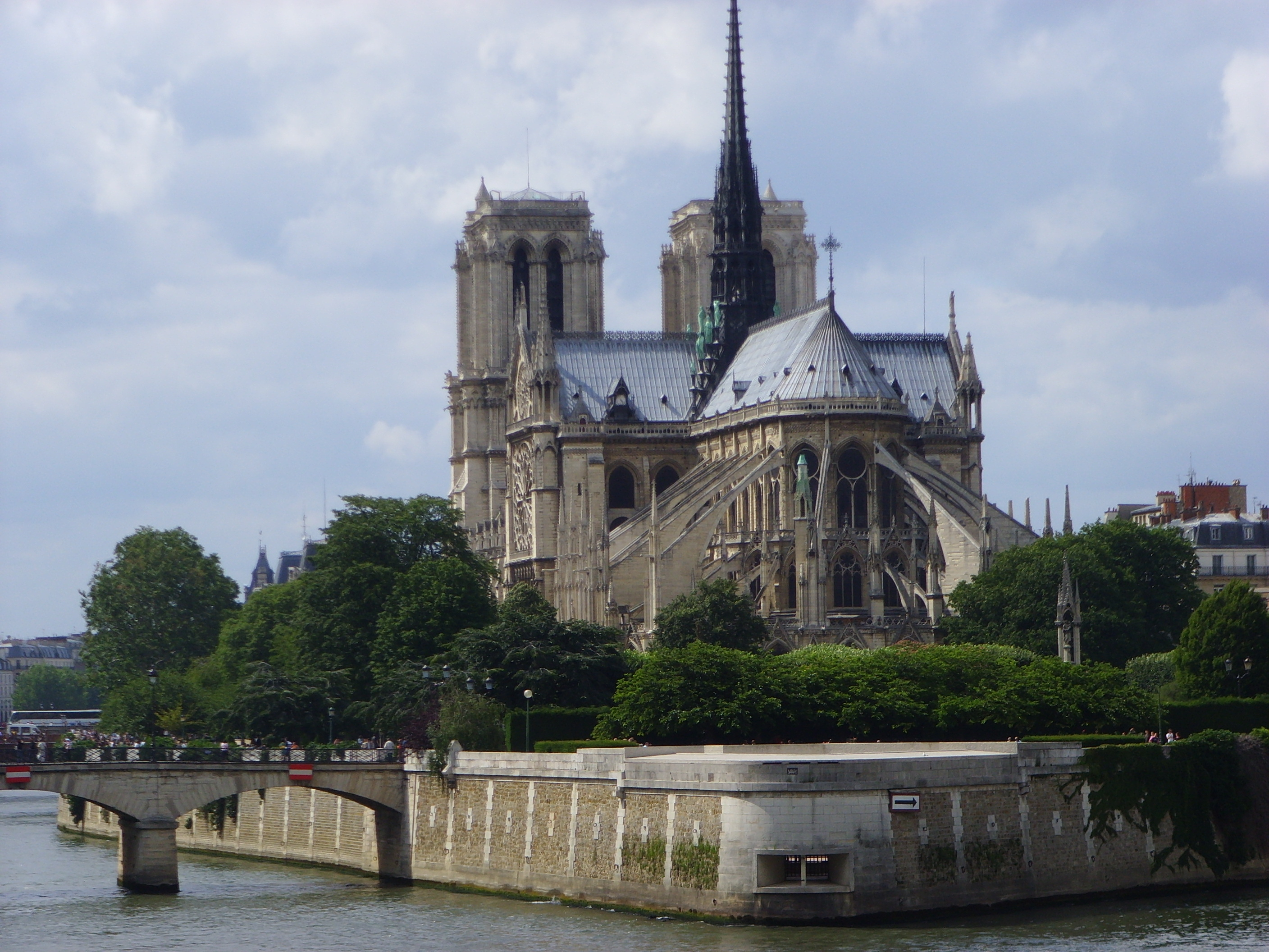 Cathédrale Notre-Dame de Paris